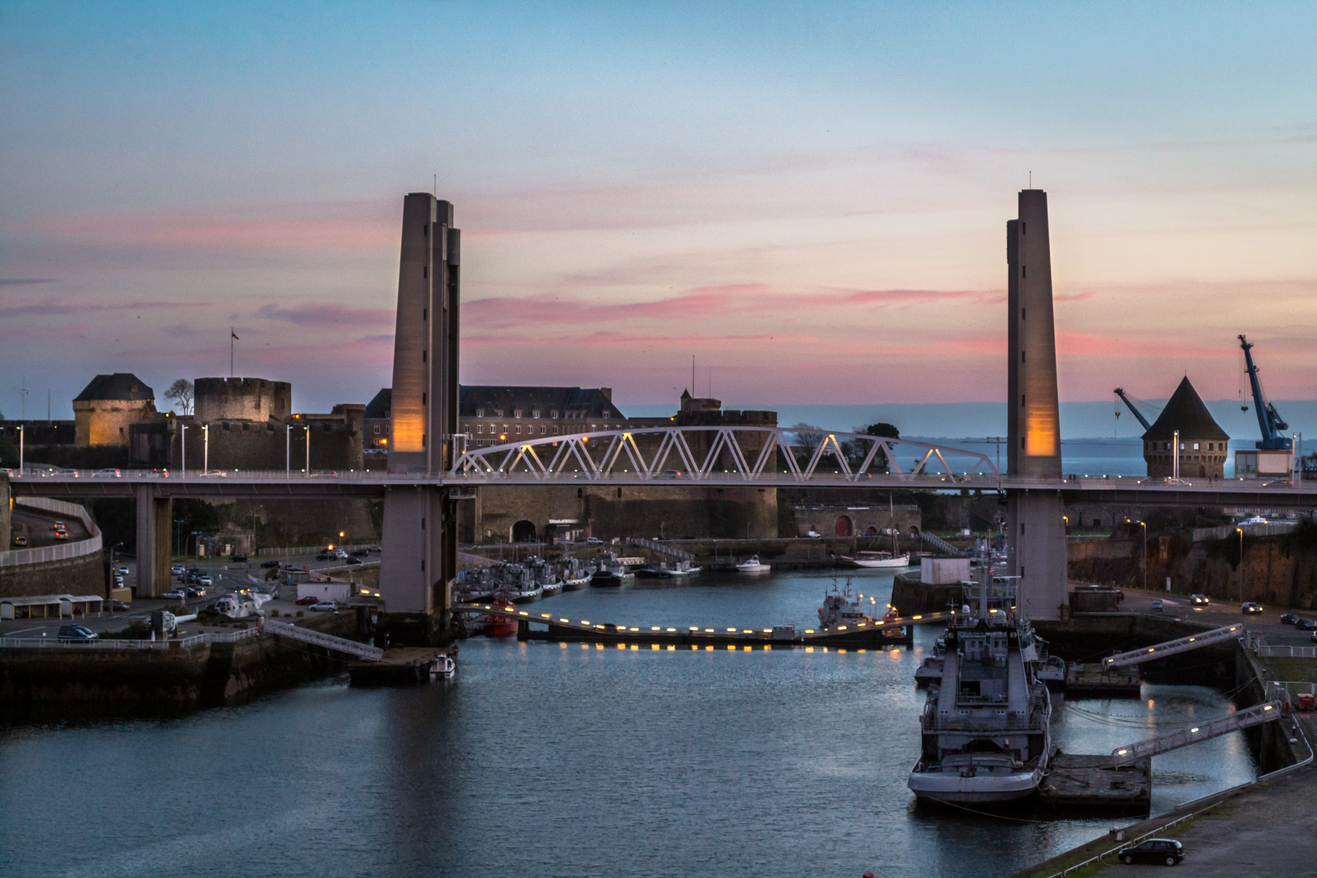 Coucher de soleil sur la Penfeld, le château, le pont et la tour Tanguy vu depuis les Ateliers des Capucins en janvier 2017.